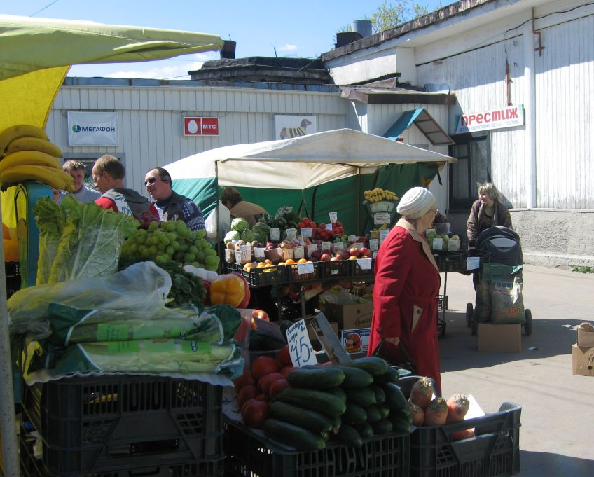 Sortavala hamarket place, Karelia